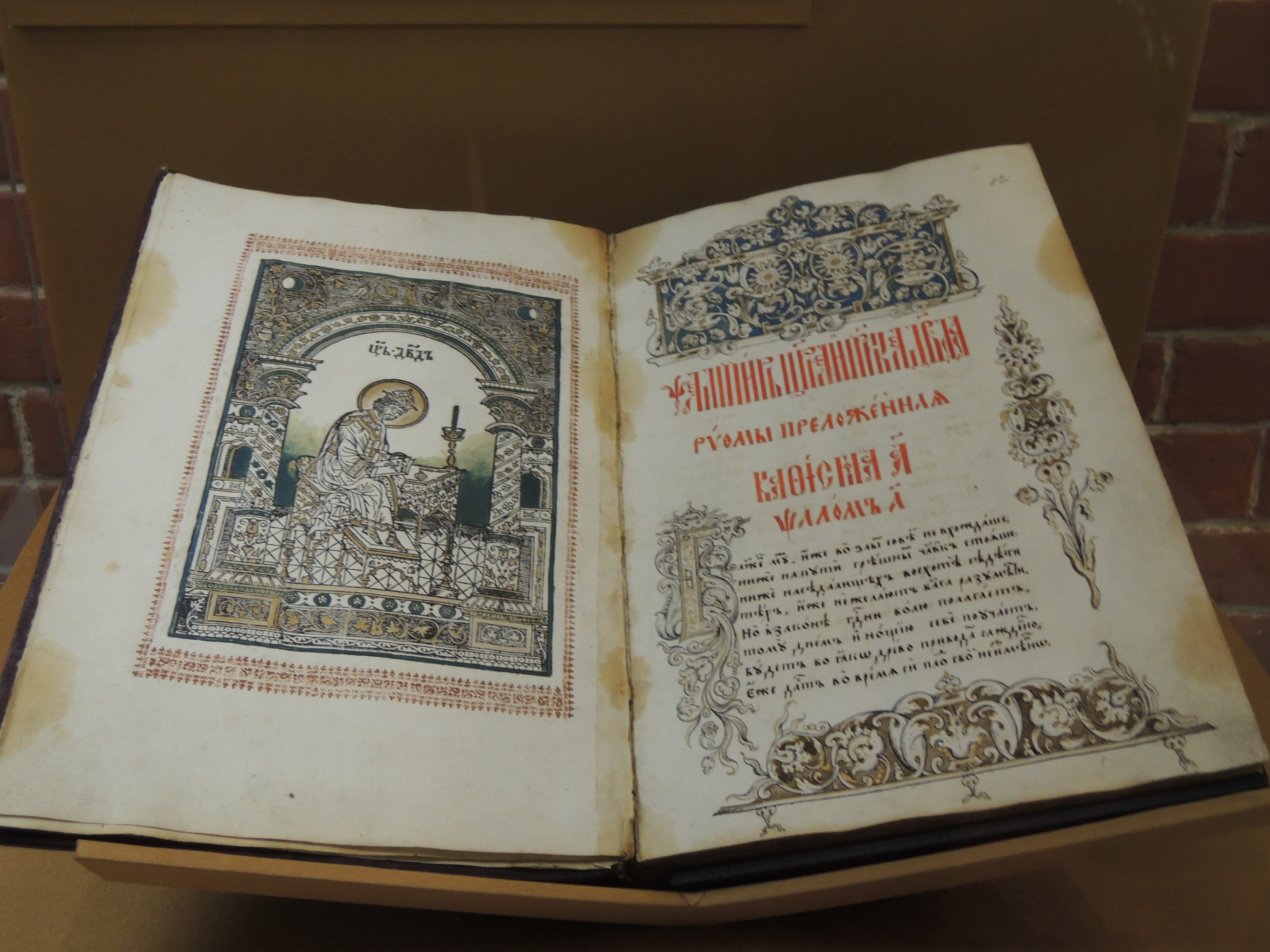 Симеон Полоцкий. Псалтырь. Подносной экземпляр. После 1680. Гравюра - царь Давид. Автограф Сильвестра Медведева